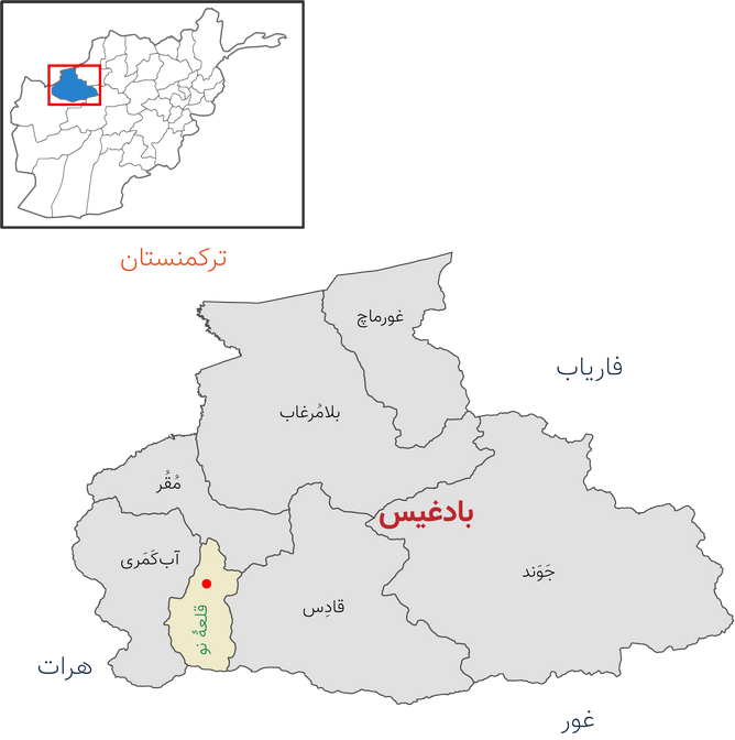 نقشه ولایت بادغیس افغانستان